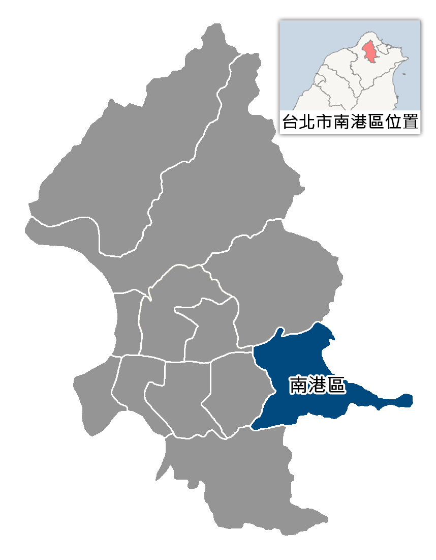 中文（台灣）: 台北市南港區位置